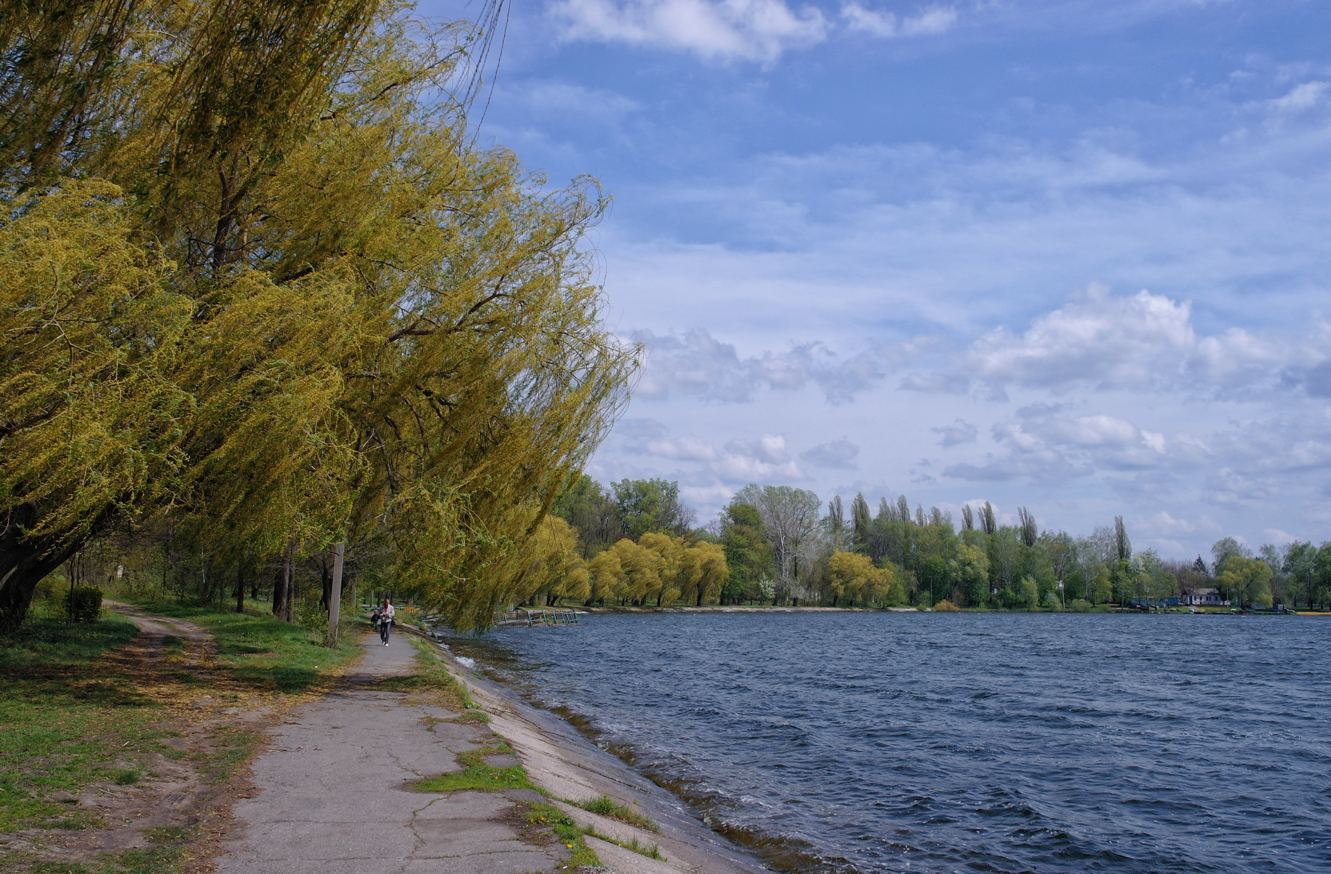 Міський парк Ватутіного